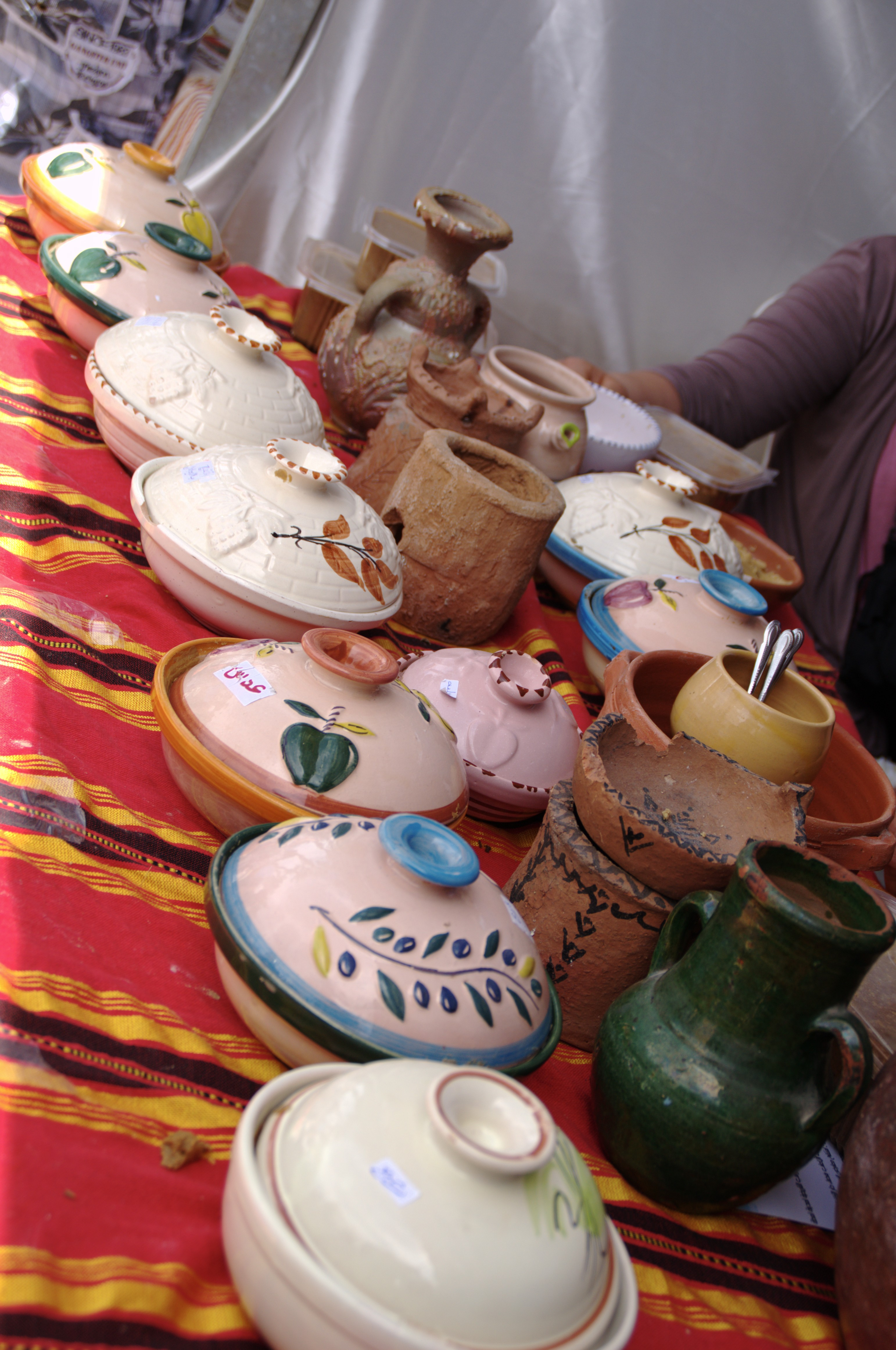 Présentation d'une série de céramiques pour bsissa